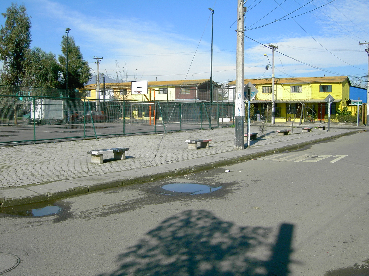 Reihenhaussiedlung in La Pintana mit Spielplatz. Viertel „Santo Tomás“. Baujahr 1988. 37 m2 Wohnraum in 2 Etagen auf meist 60 m2 Grundstück.